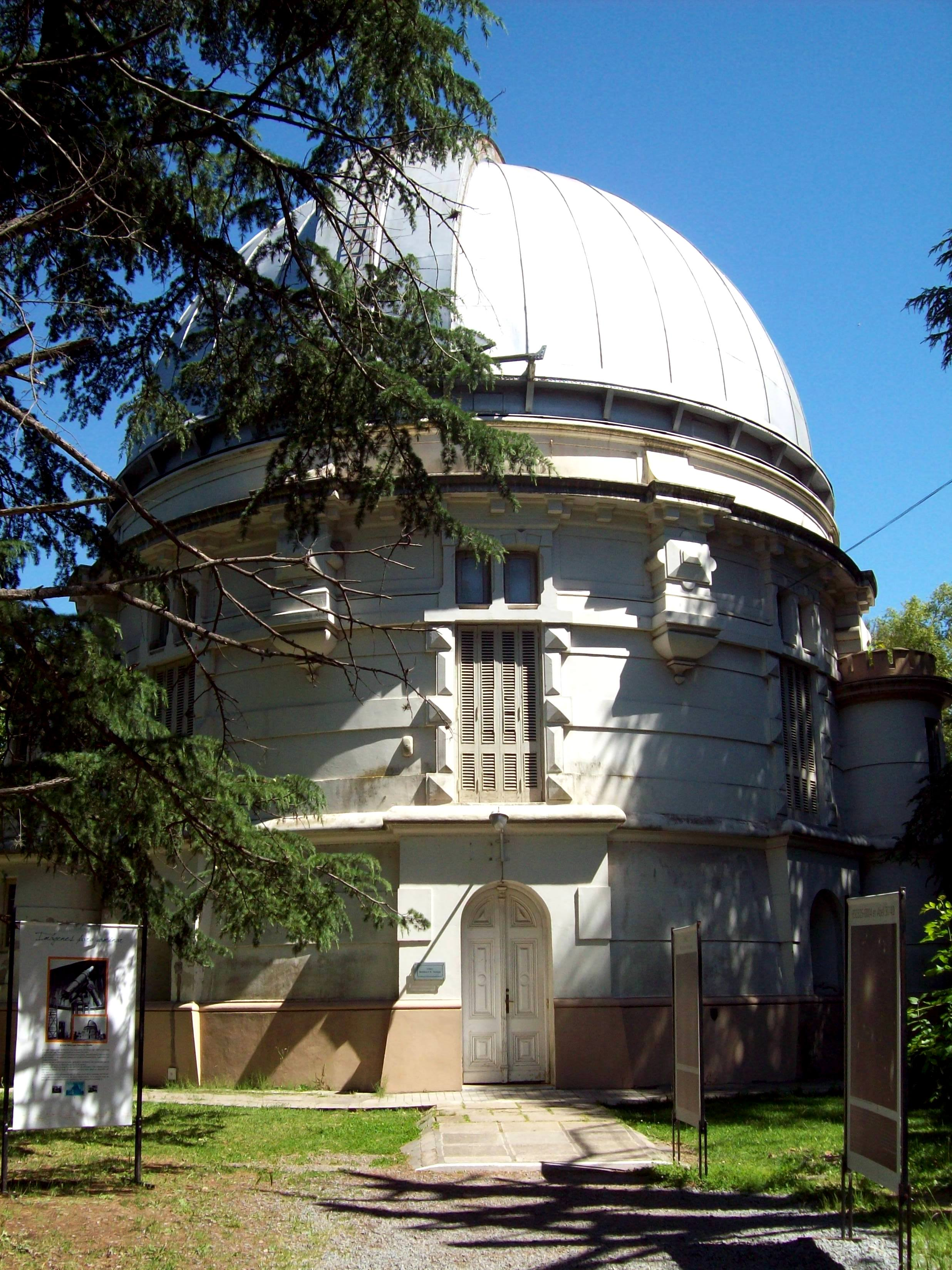 Observatorio de La Plata.